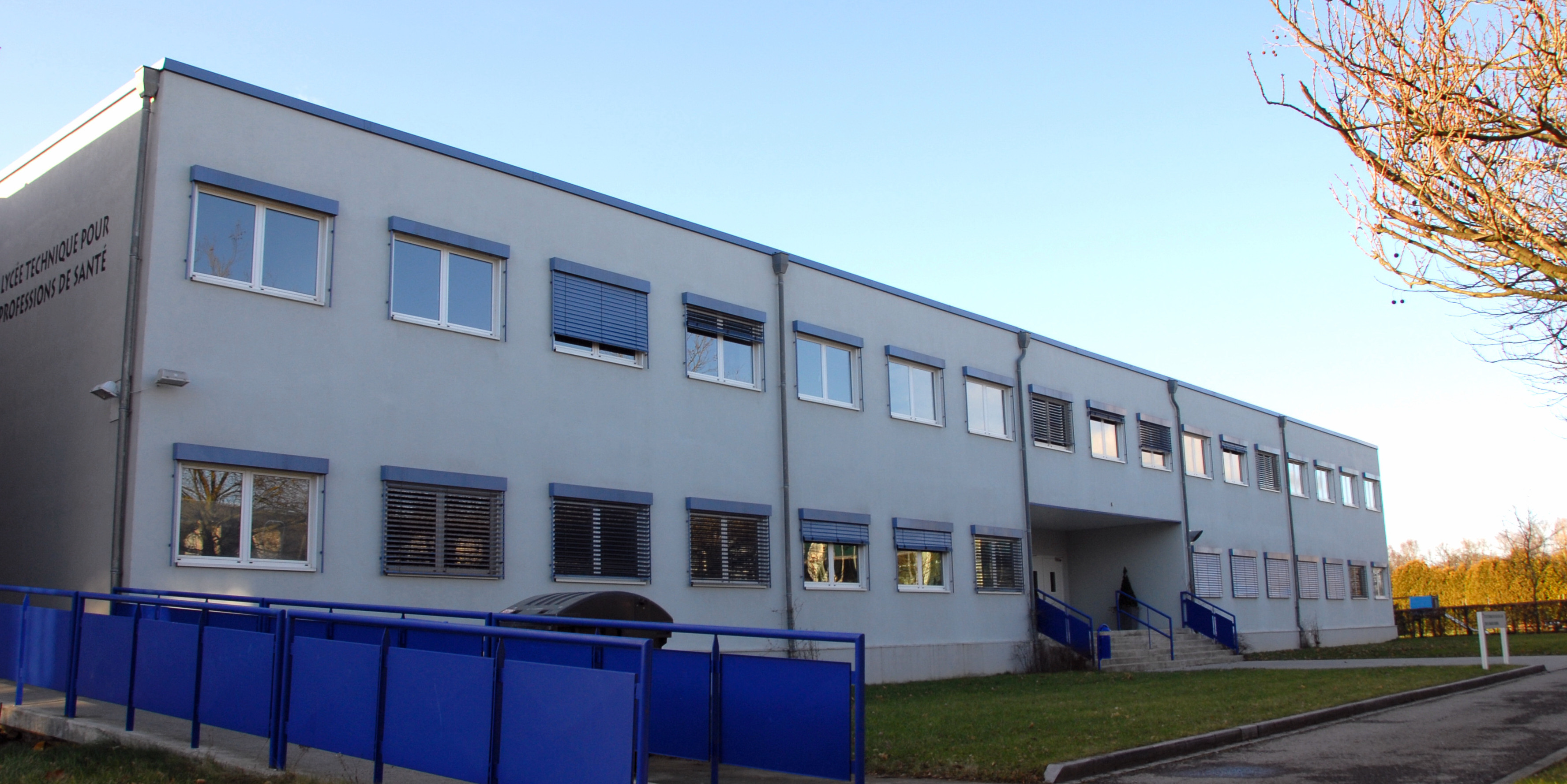 Lycée technique pour professions de santé, Centre de formation Luxembourg.